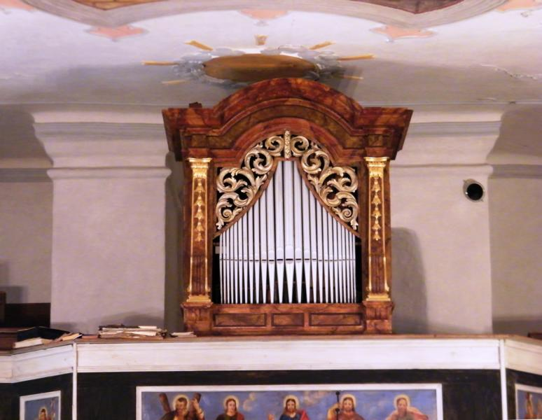 Egedacher-Orgel Astätt